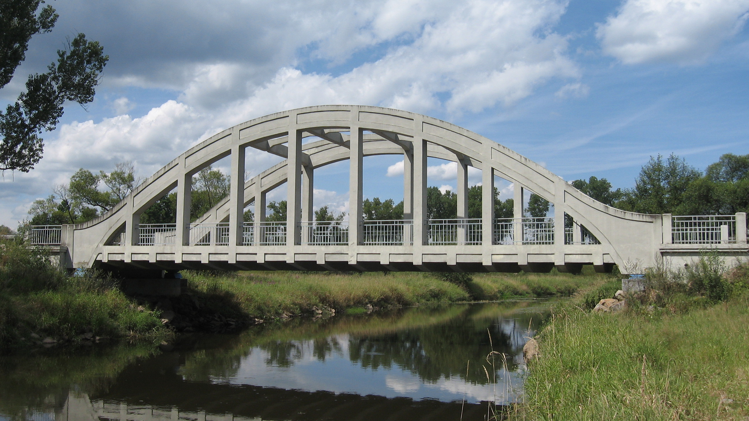 Most přes řeku Lužnici spojující obce Dvory nad Lužnicí a Halámky